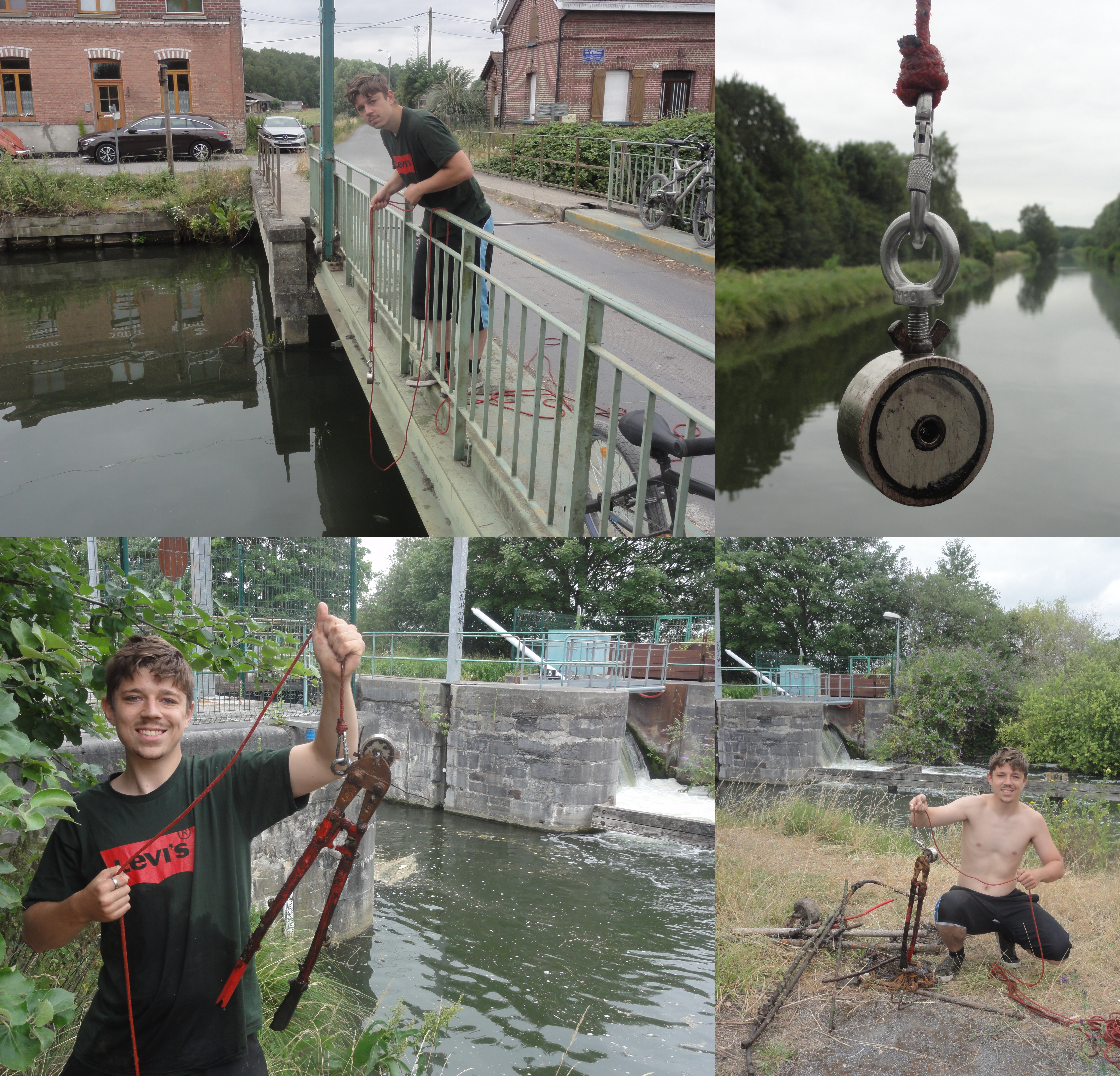 Pêche à l'aimant dans la Scarpe à Lallaing, en France. Depicted place: Lallaing